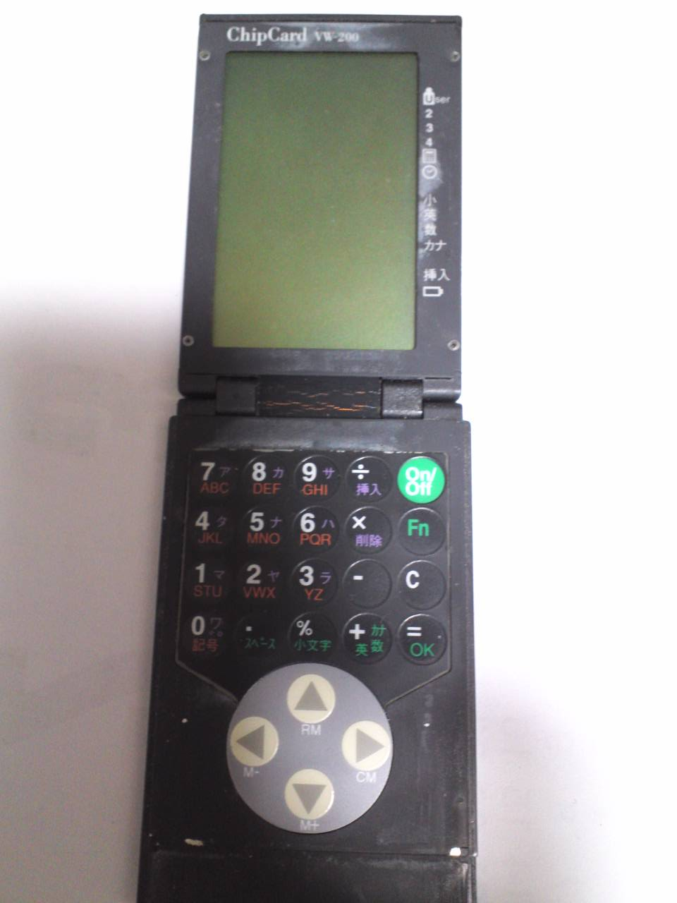 IBMのPCMCIAカード型PDA CHIPCARD VW200